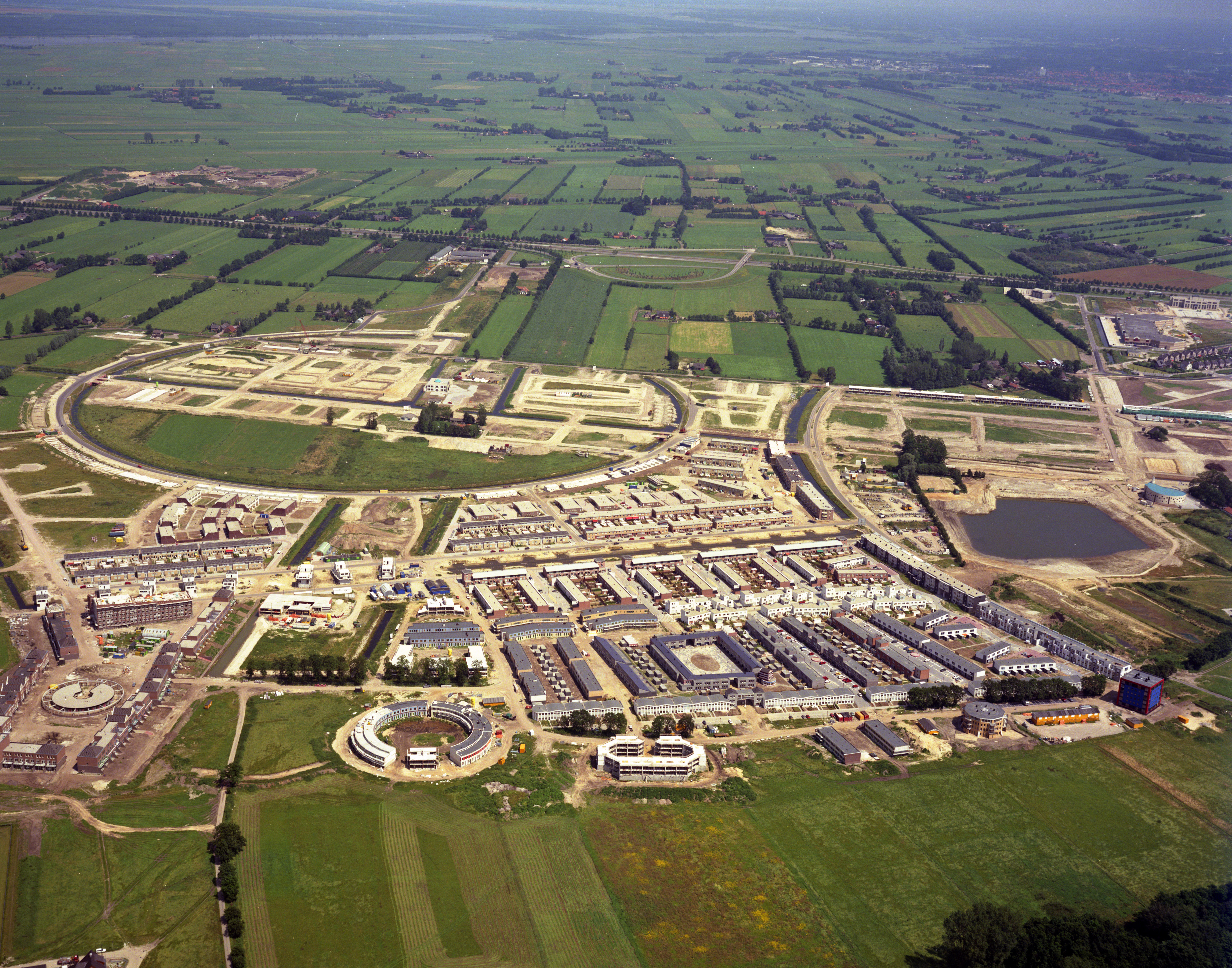 Luchtfoto van de in aanleg zijnde wijk Kattenbroek te Amersfoort uit het zuiden. Het Utrechts Archief, Catalogusnummer 50024